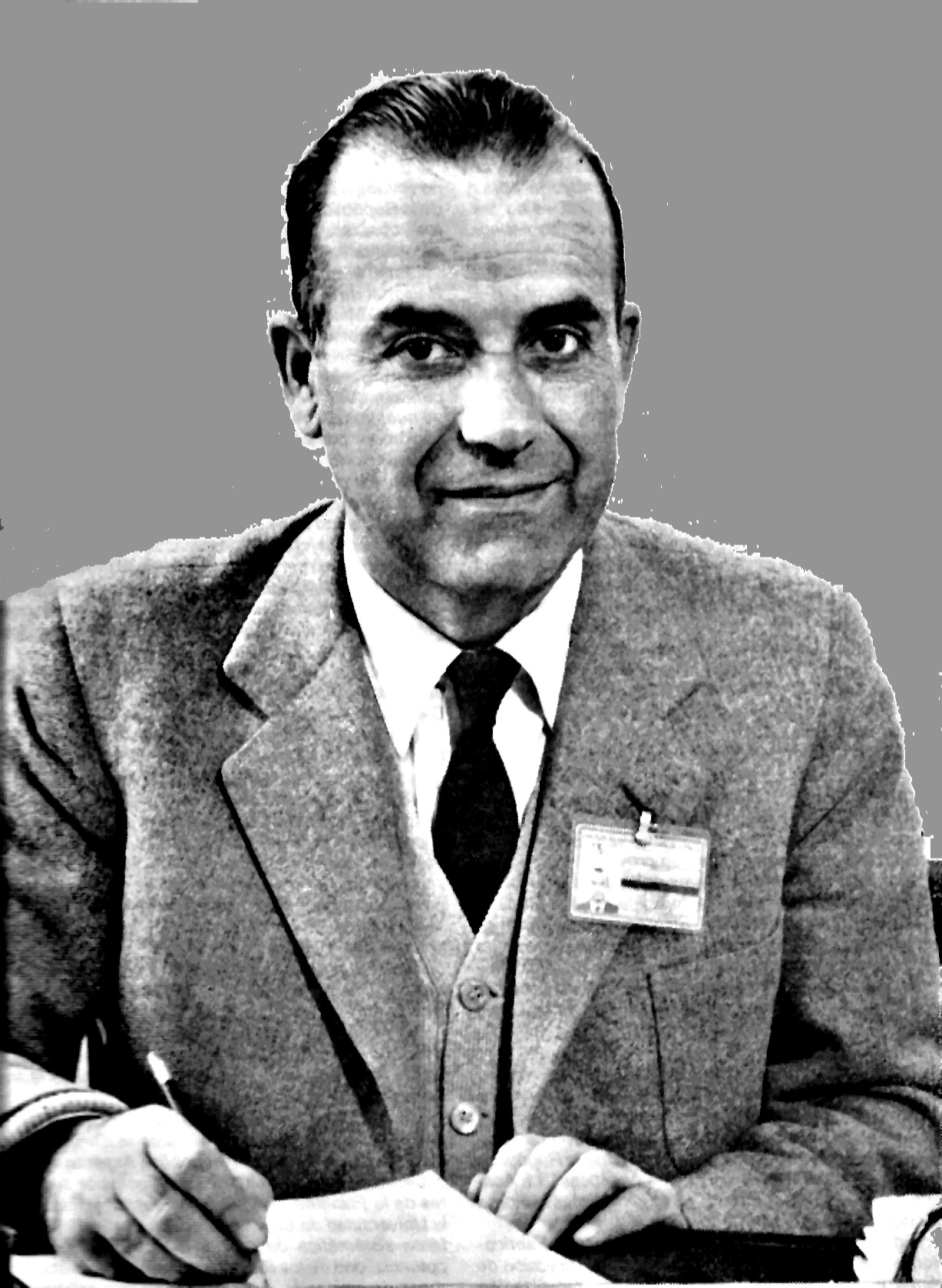 Ing. Victorio Angelelli, Geólogo ítalo-argentino